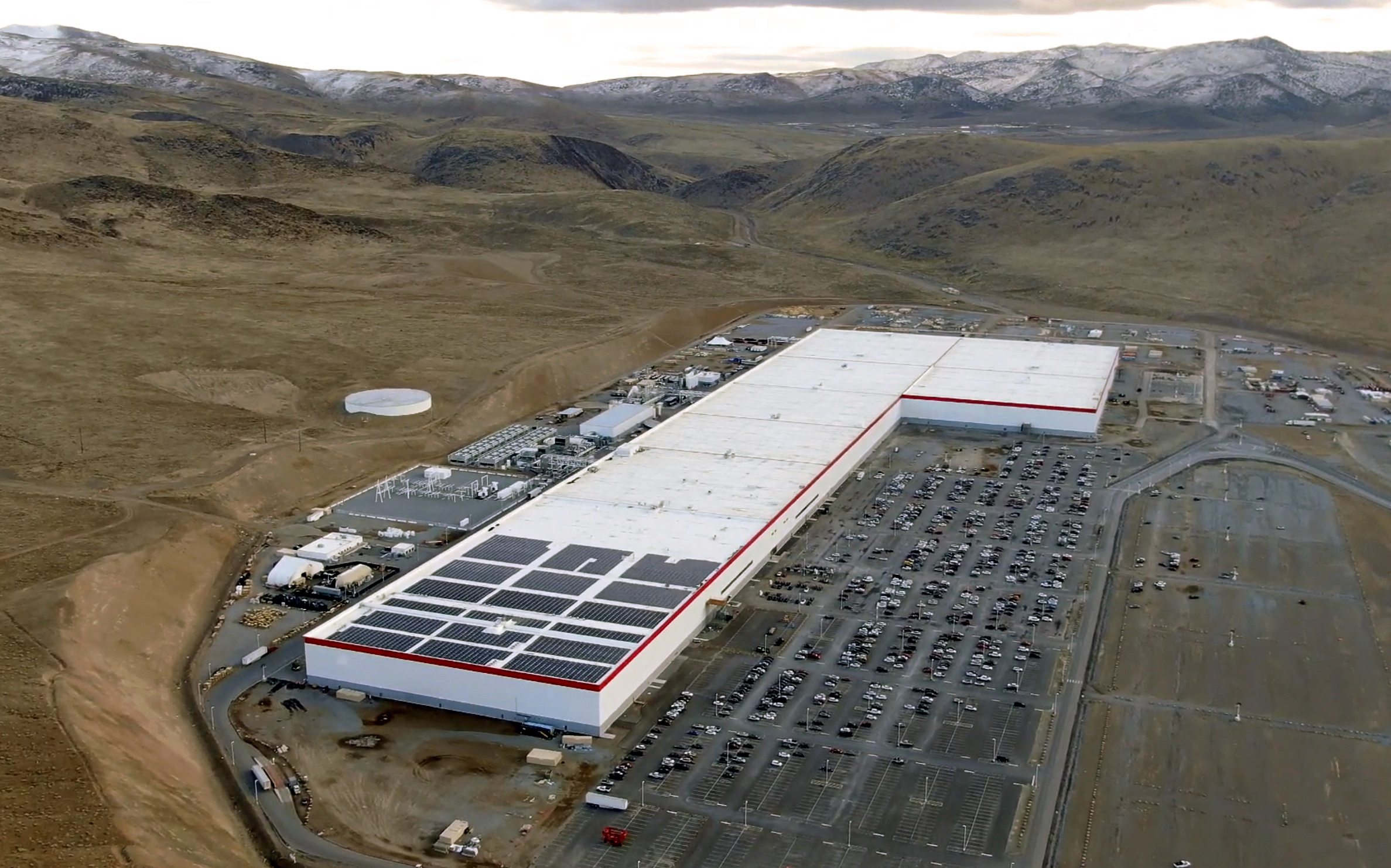 Tesla Gigafactory 1 - December 2019